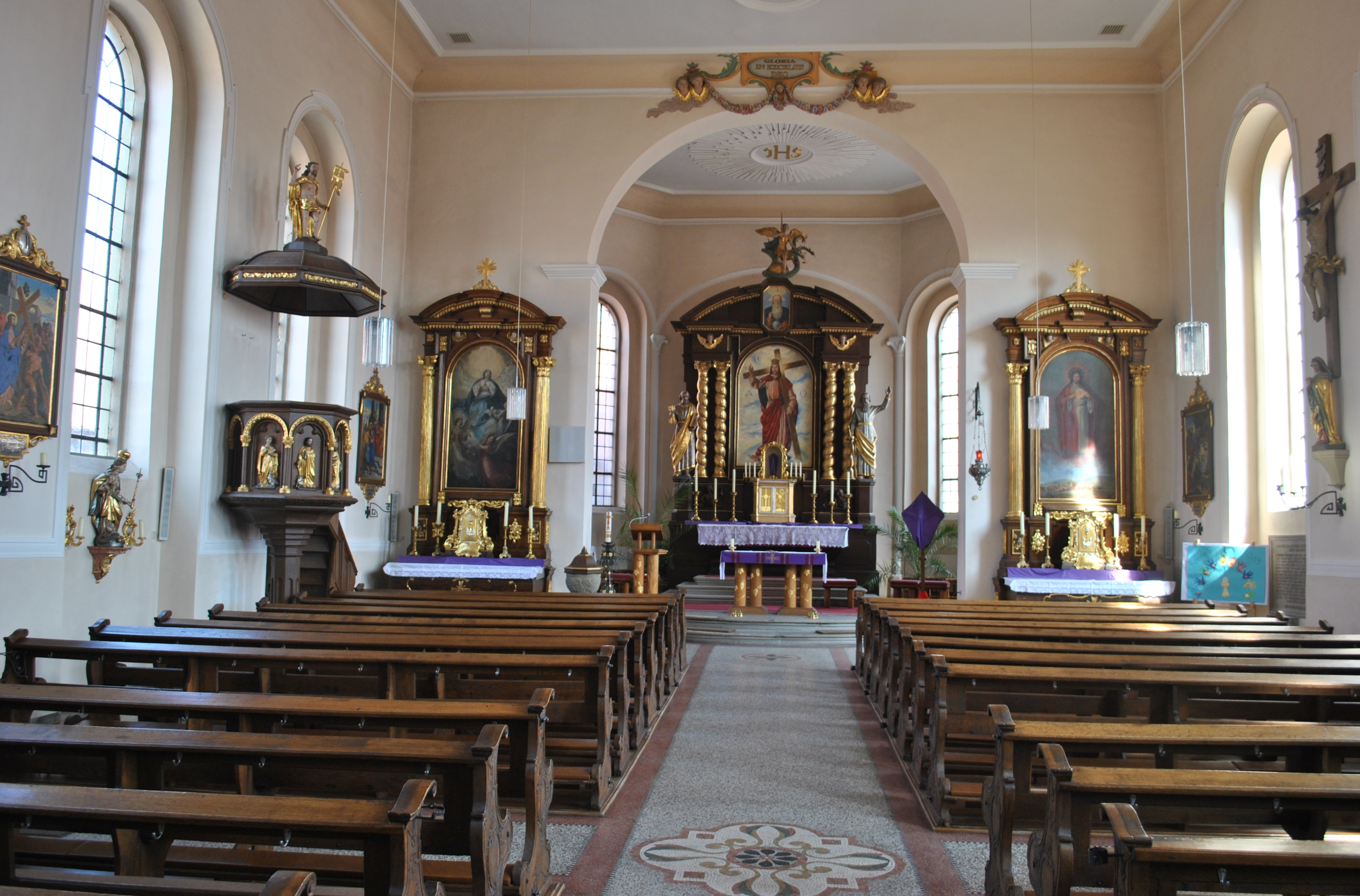 Katholische Pfarrkirche St. Peter und Paul Saalraum mit eingezogenem Polygonalchor, von Thaddäus Dückelmann, 1810–1813; mit Ausstattung D-6-75-167-2